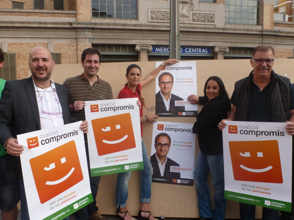 Pegada de cartells a Alacant.